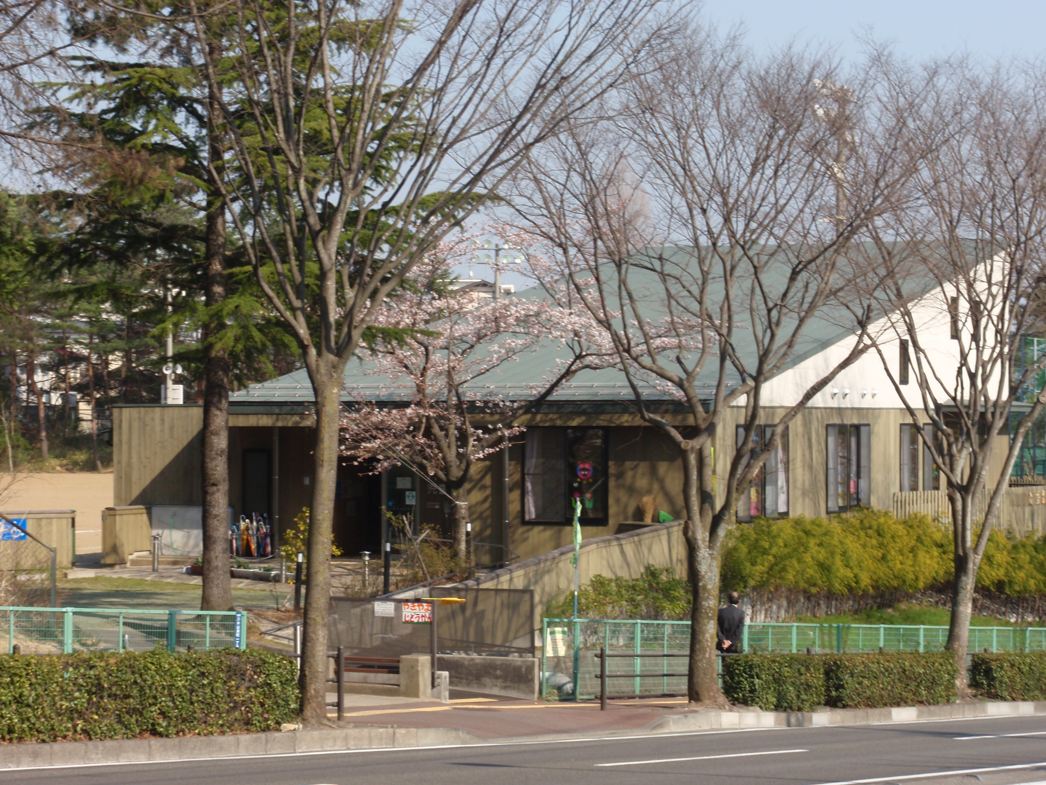 仙台市立八木山小学校に隣接する八木山児童館です。